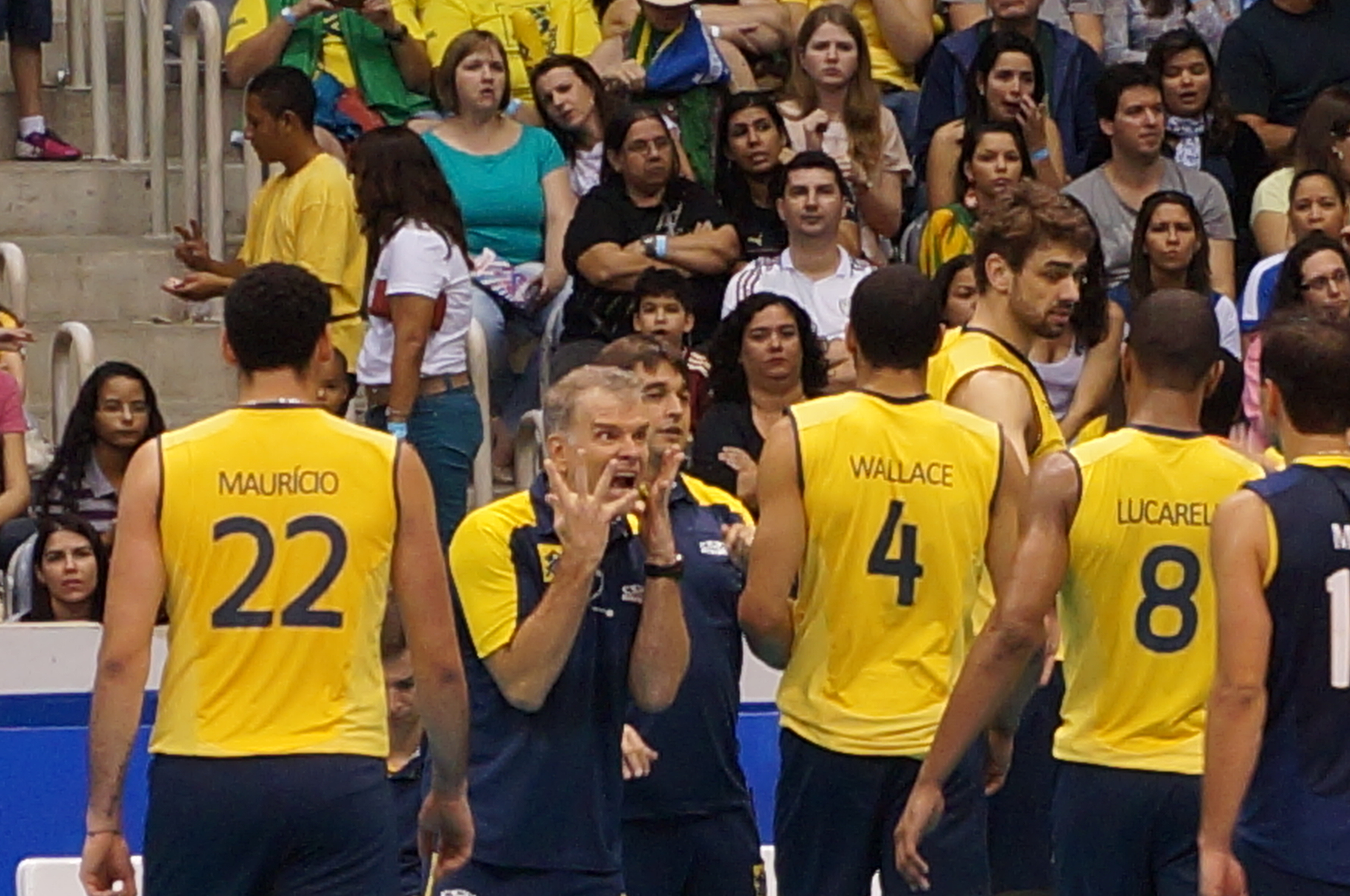 Brazil 3 - 1 USA. FIVB Volleyball World League 2013. Maracanãzinho, Rio de Janeiro.